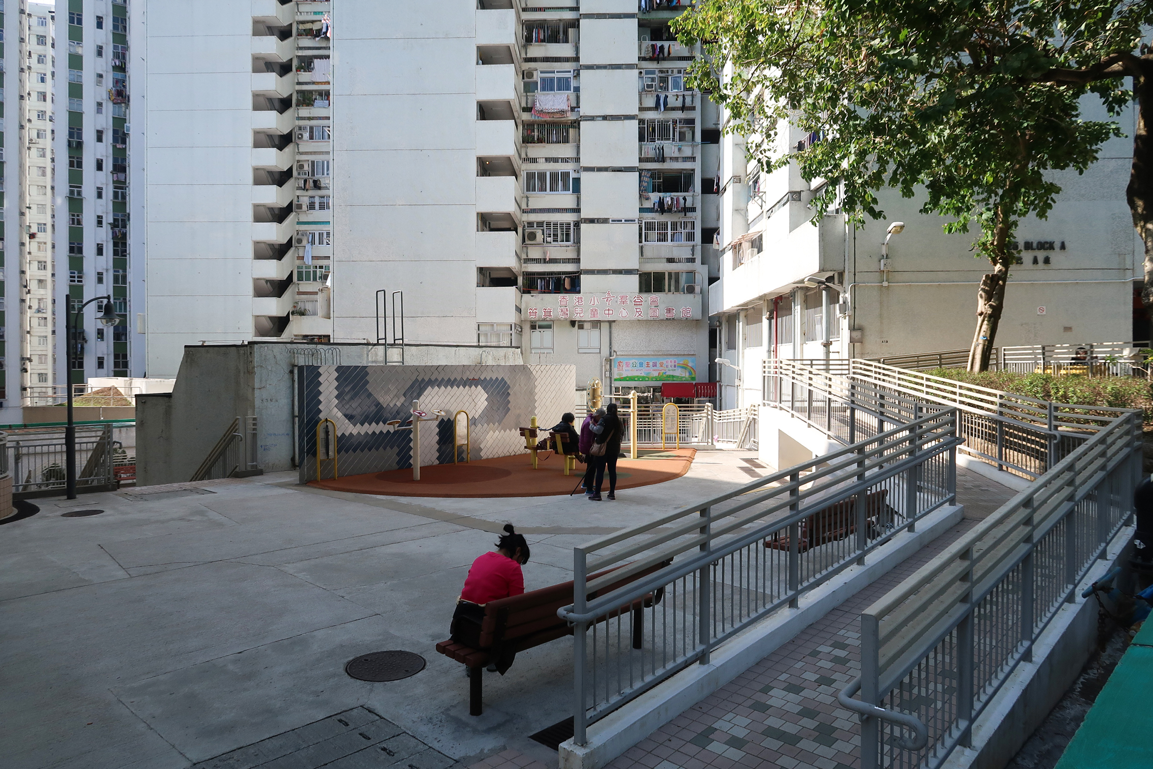 Ming Wah Dai Ha